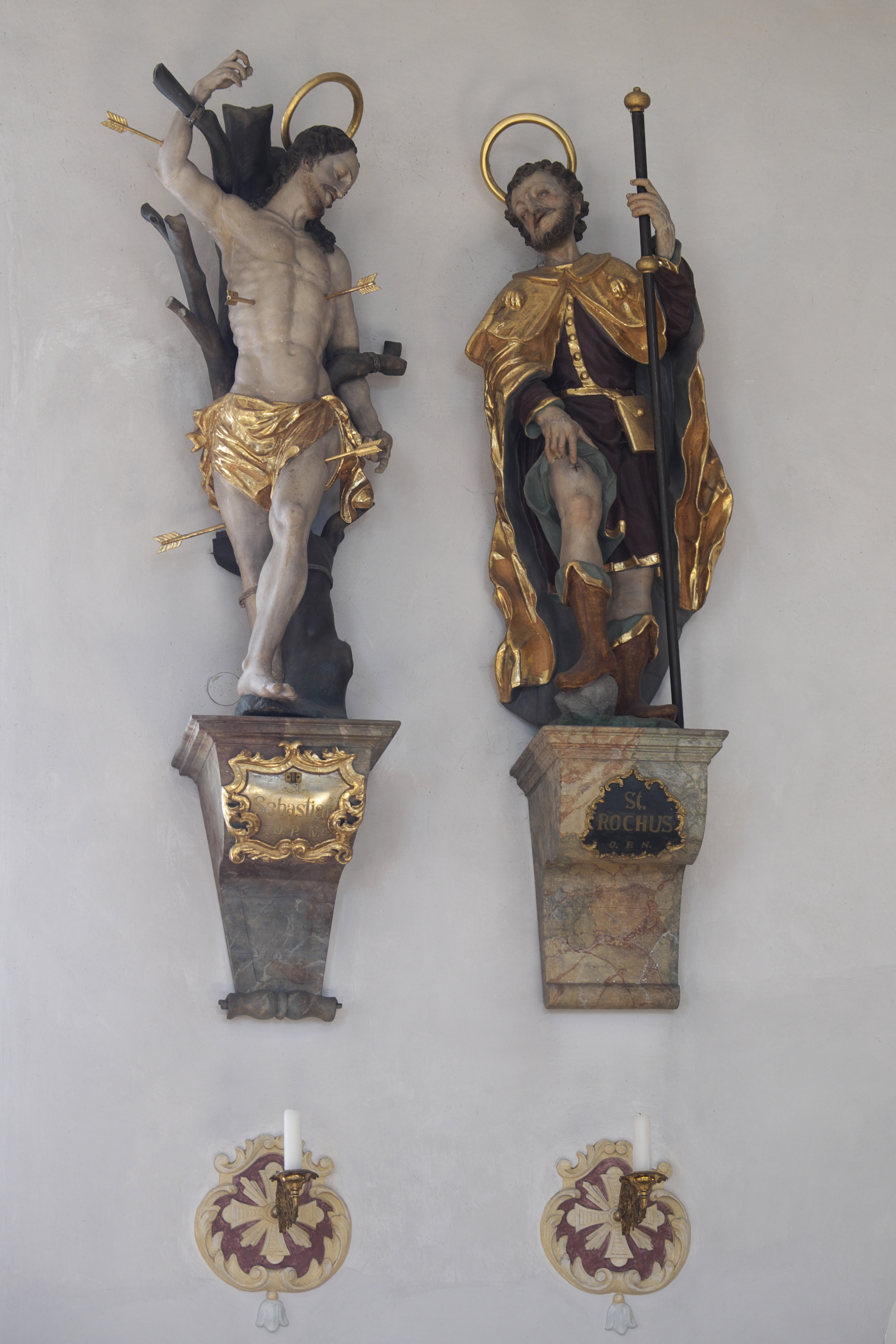 Katholische Pfarrkirche St. Martin in Penzing im Landkreis Landsberg am Lech (Bayern/Deutschland), Skulpturen des heiligen Sebastian und des heiligen Rochus von Montpellier, von Johann Luidl, um 1730/40